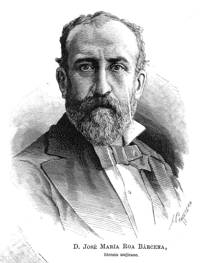 Retrato de José María Roa Bárcena, publicado en la revista española La Ilustración Española y Americana.